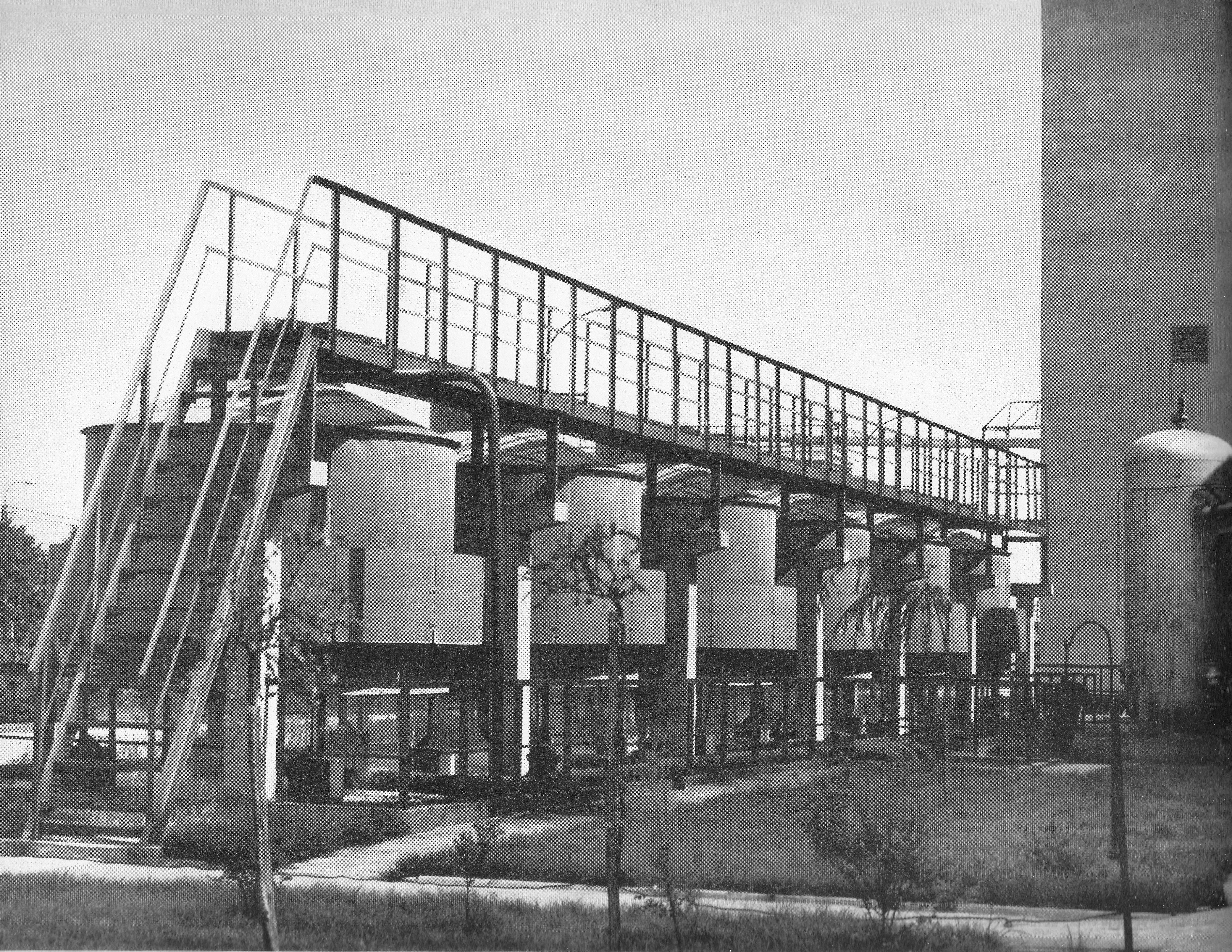 Browar w Sieprcu